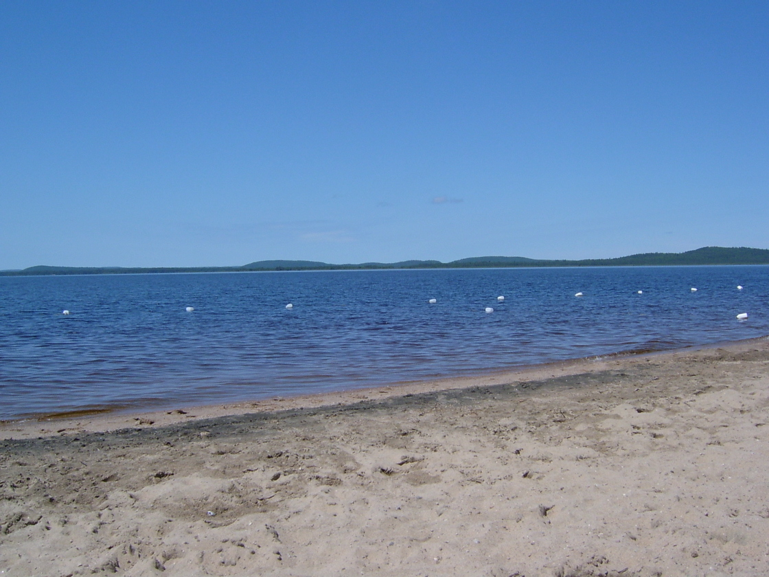 Réservoir Baskatong, Québec, Canada